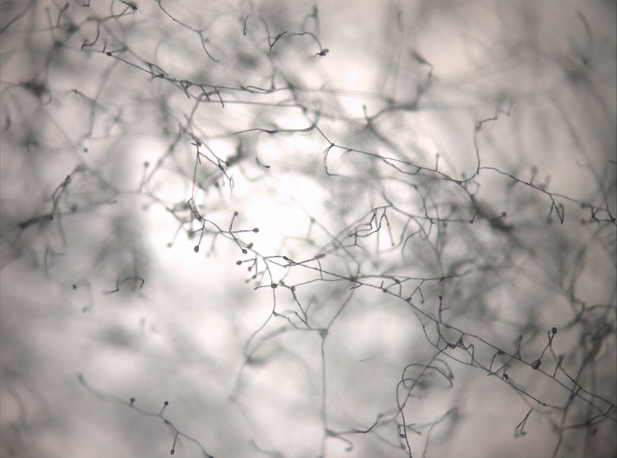 Blick in 160-fach vergrösserte Kolonie von F. verticillioides, fokussiert auf Monophialiden